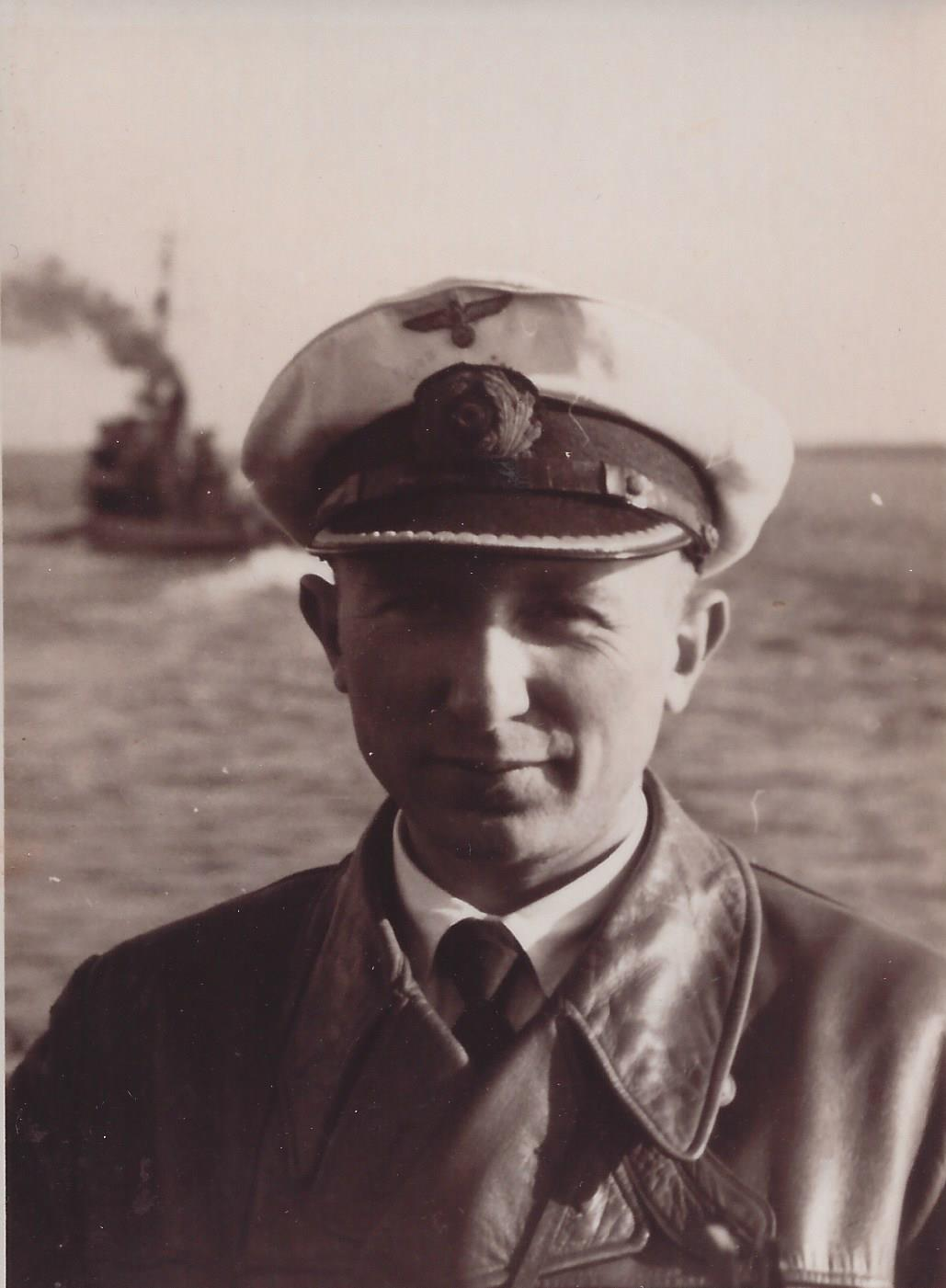 Porträtfotografie von Hans Tägert als Marineoffizier und Kommandant des Minensuchboots 293